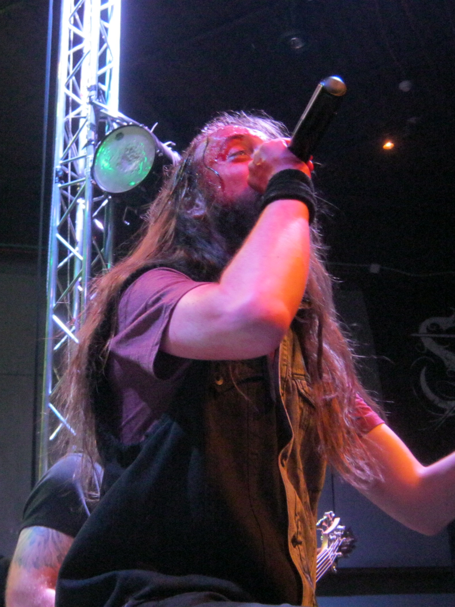 Prey For Nothing Vs Scardust - Metal Fight 02.06.16, Israel